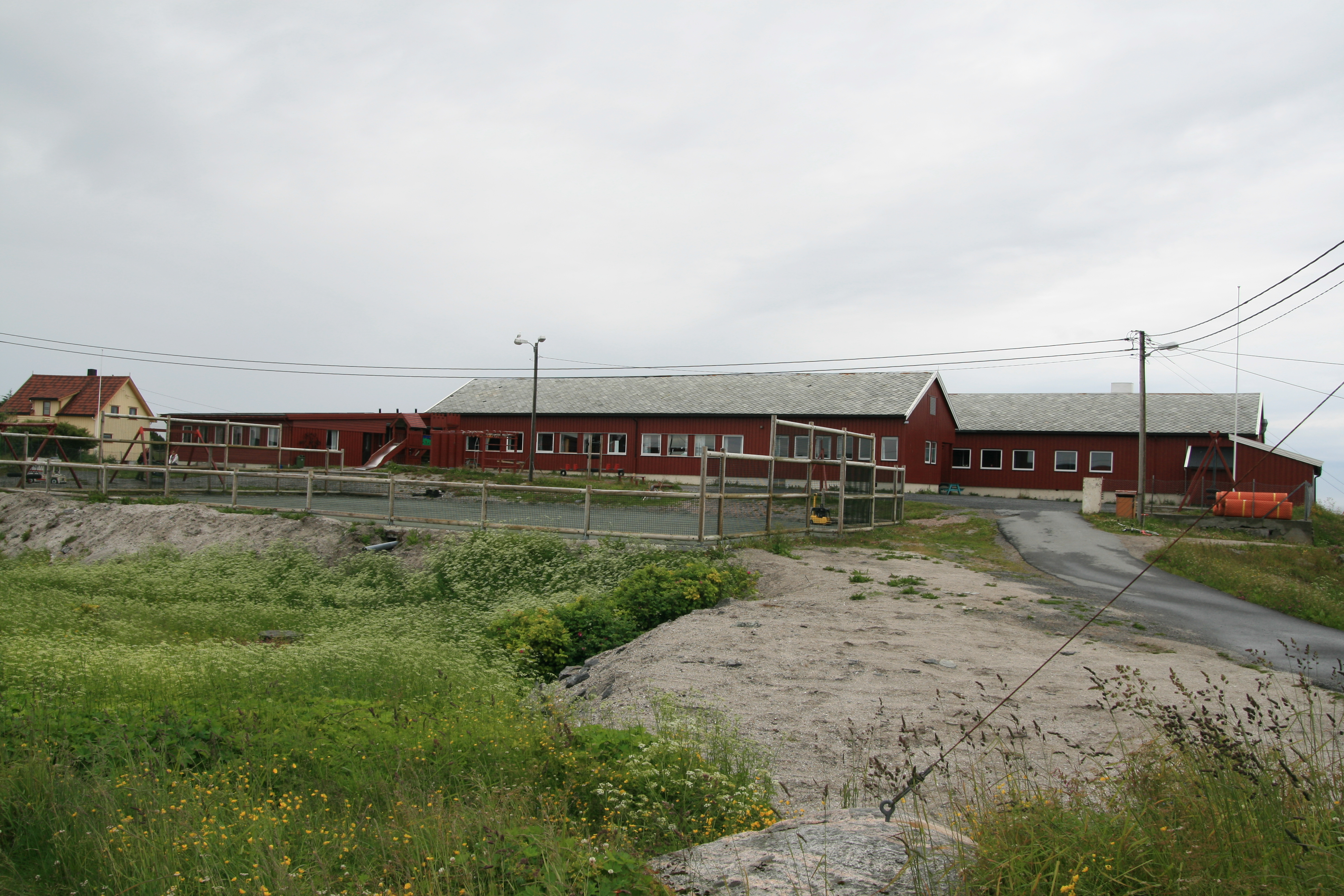 Mausund skole